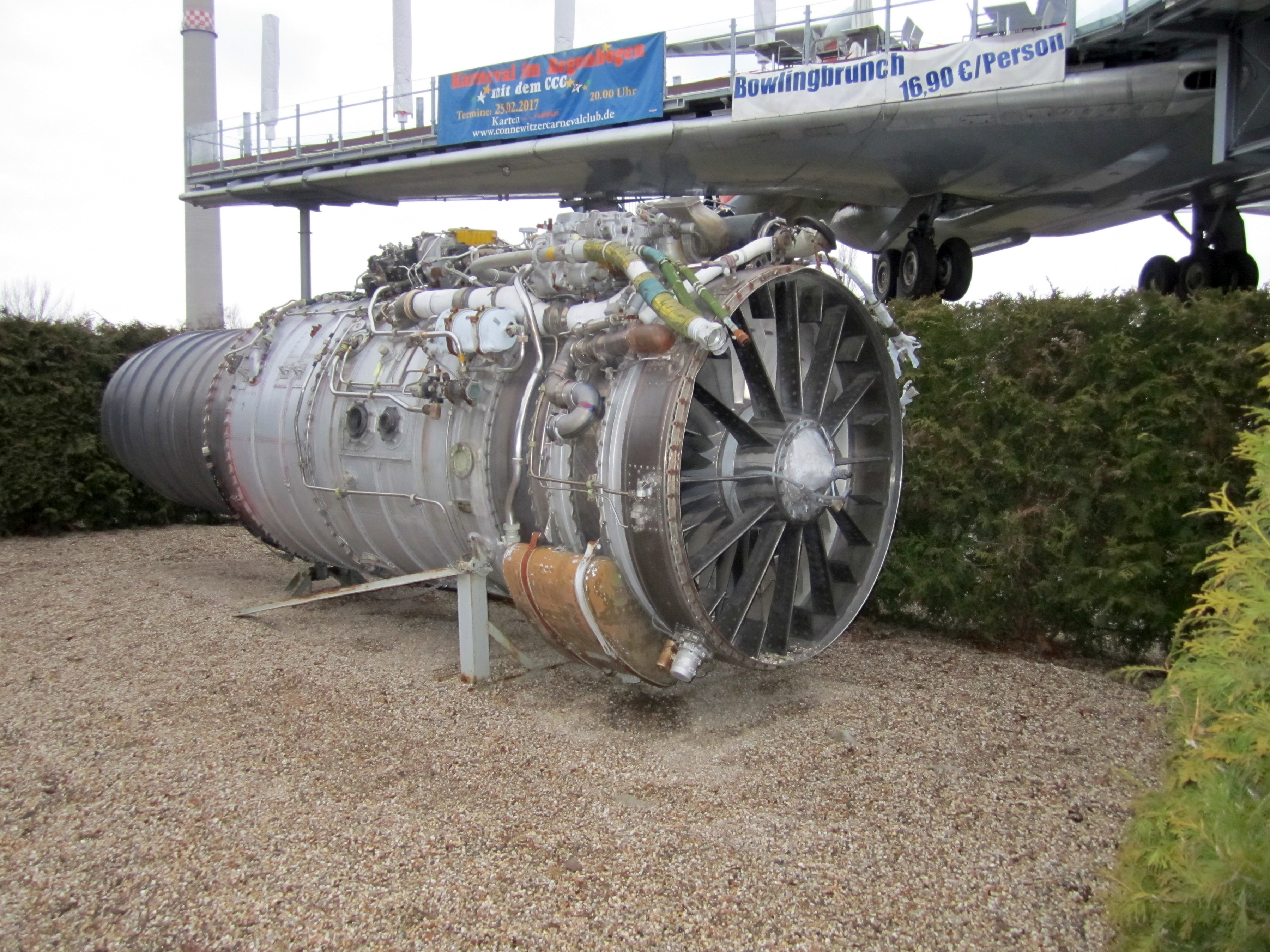 Kusnezow NK-8-4-Triebwerk der Il-62 DDR-SEF. Nutzung als Restaurant. Leipzig, Sachsen, Deutschland.